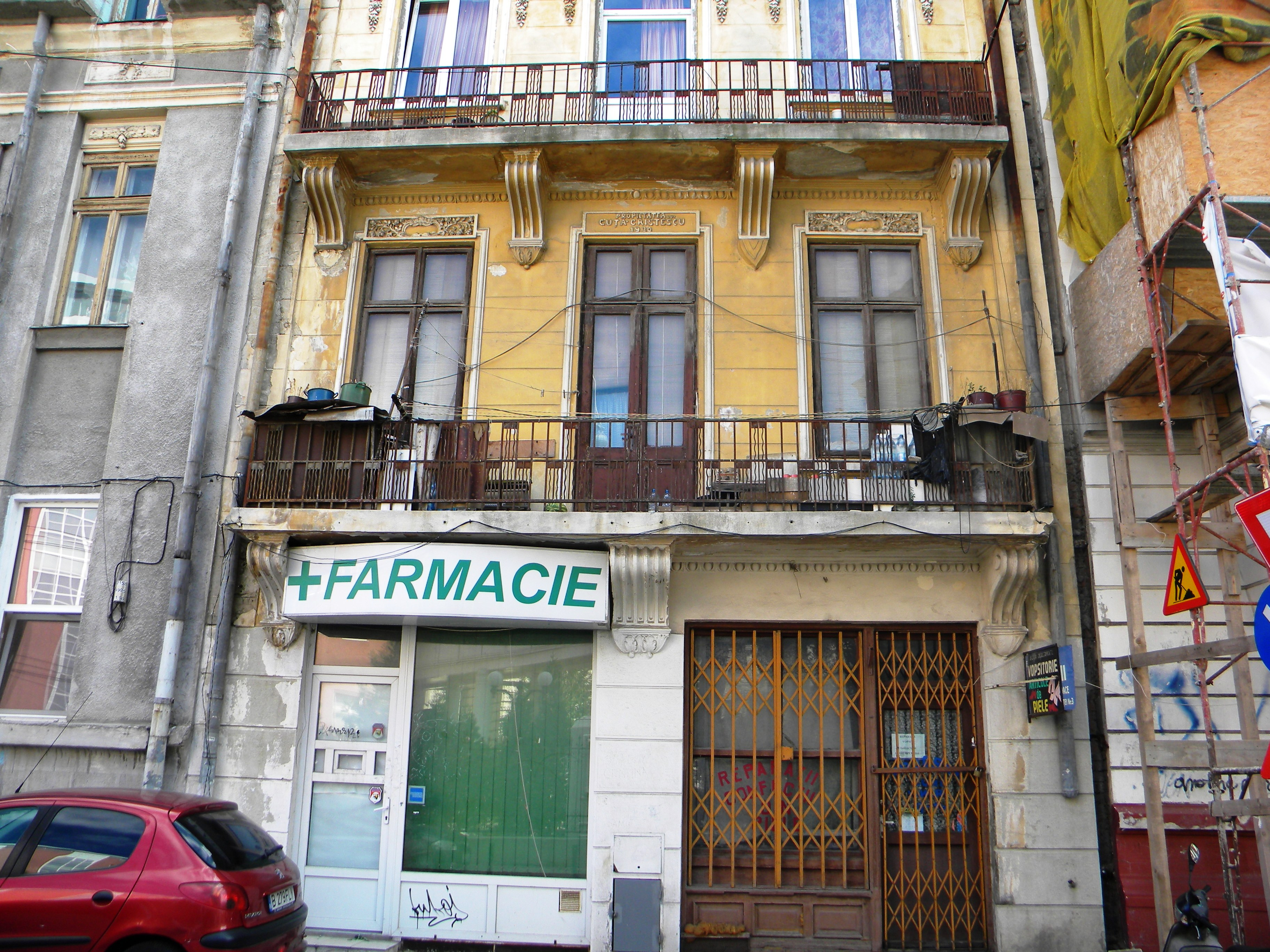 Bucuresti, Romania, Casa pe Str. Slanic nr. 4, sect. 3